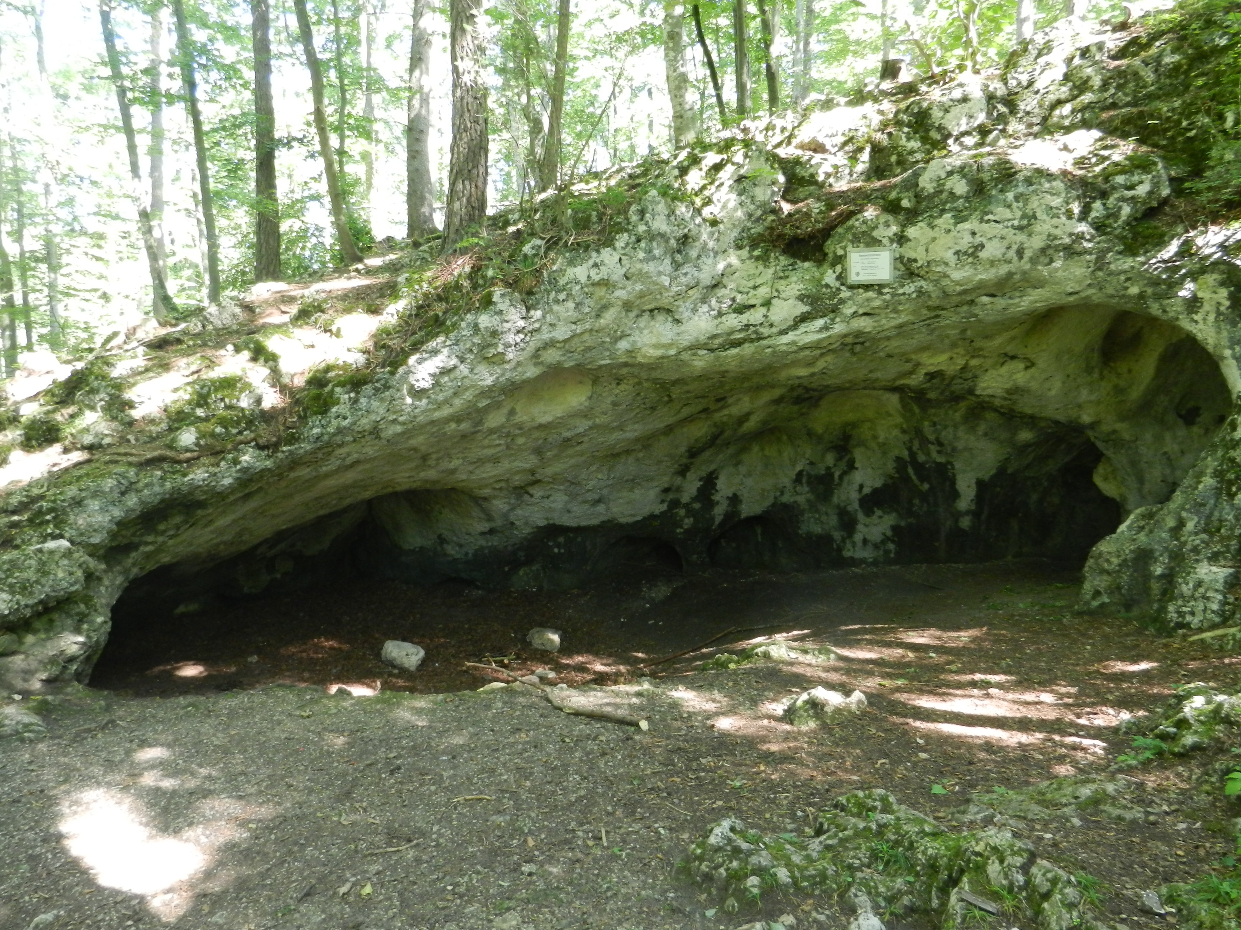 Sommerkirchhöhle bei Melchingen, Ortsteil von Burladingen